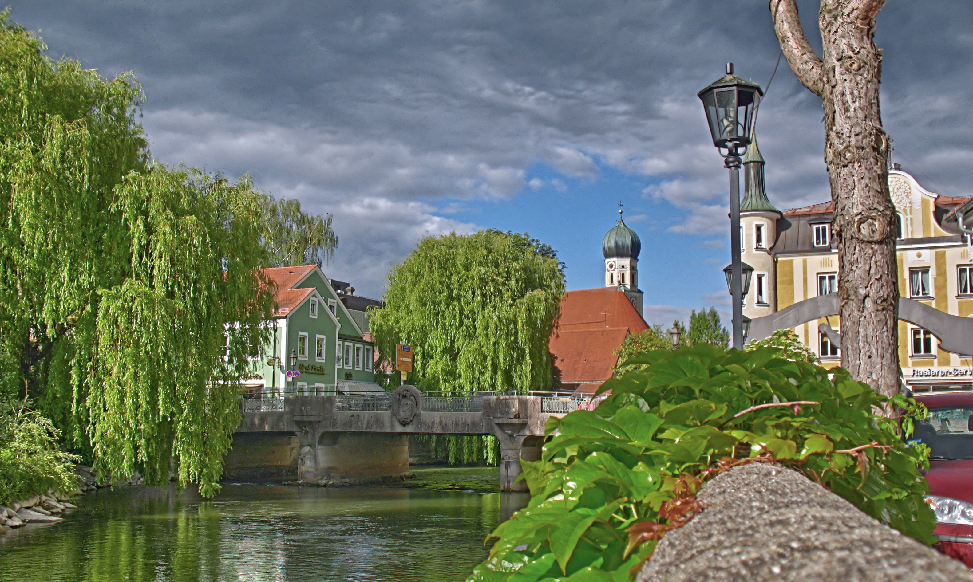 Deutschland, Bayern, Fürstenfeldbruck, Fluß Amper, Kirche St. Magdalena